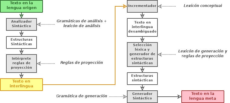 Figura 4: Proceso de traducción en un sistema basado en el conocimiento.